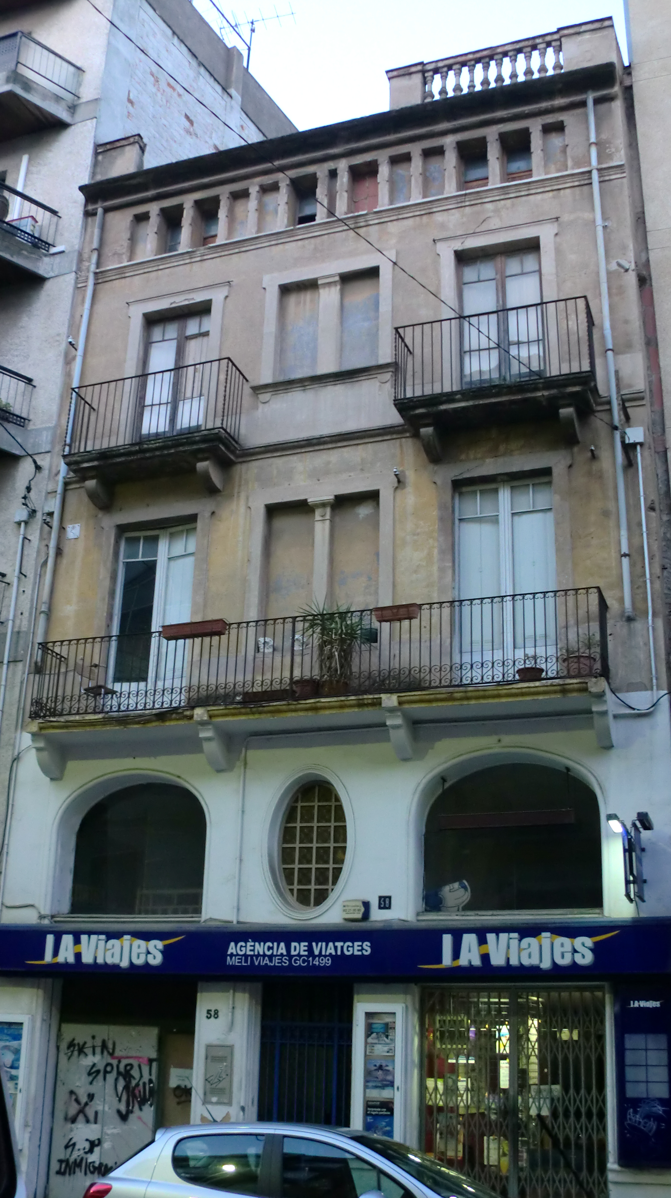 Habitatge al carrer Nou, 58 (Figueres)